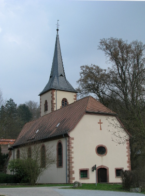 Evangelische Kirche Heiligkreuz in Weinheim-Heiligkreuz.